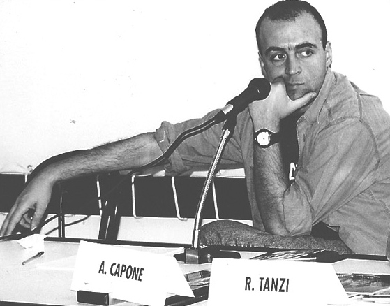 Ade Capone, sceneggiatore di fumetti, scrittore, autore televisivo